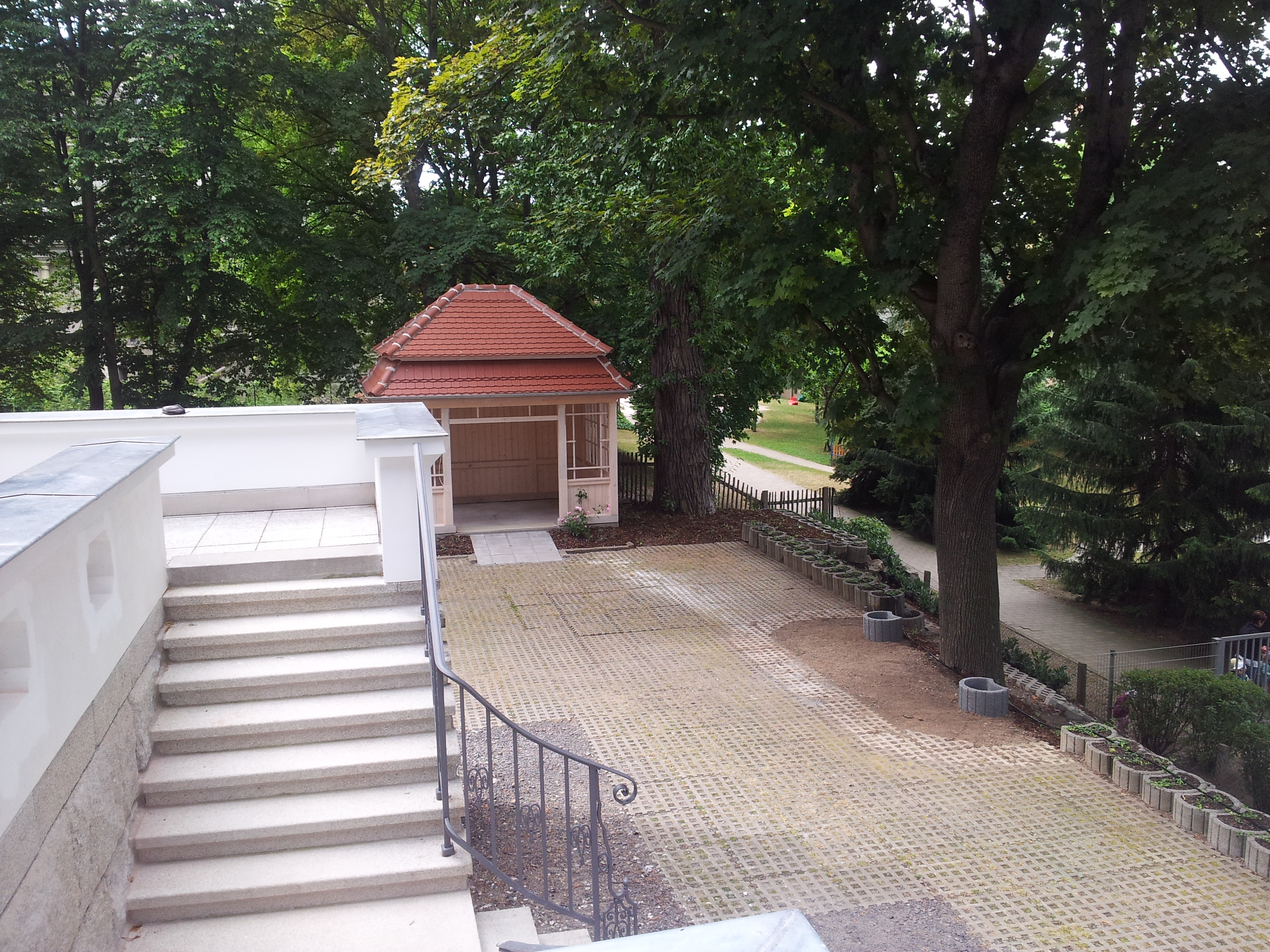 Pavillon